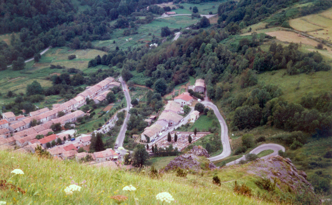 Montsegur